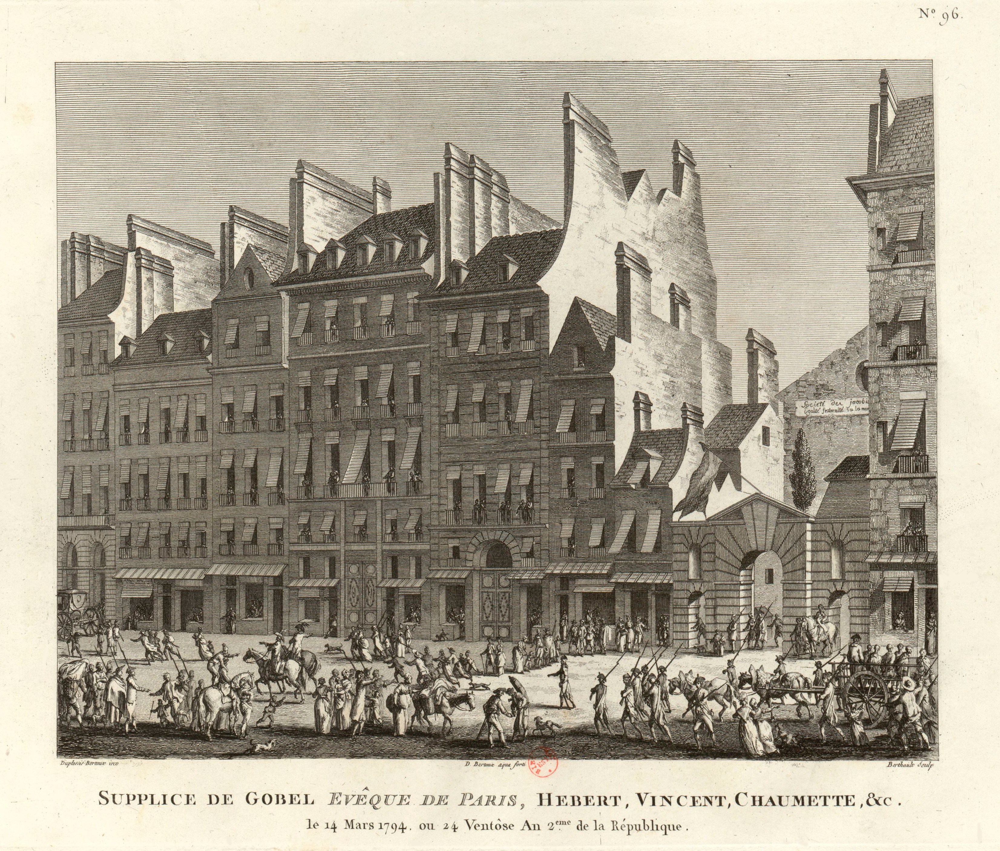 Jacques-René Hébert, Pierre-Gaspard Chaumette, François-Nicolas Vincent et Jean-Baptiste Gobel sont conduits en charrette à la guillotine le 24 ventôse an II (14 mars 1794). Tableau nº 96, extrait de la Collection complète des tableaux historiques de la Révolution française.